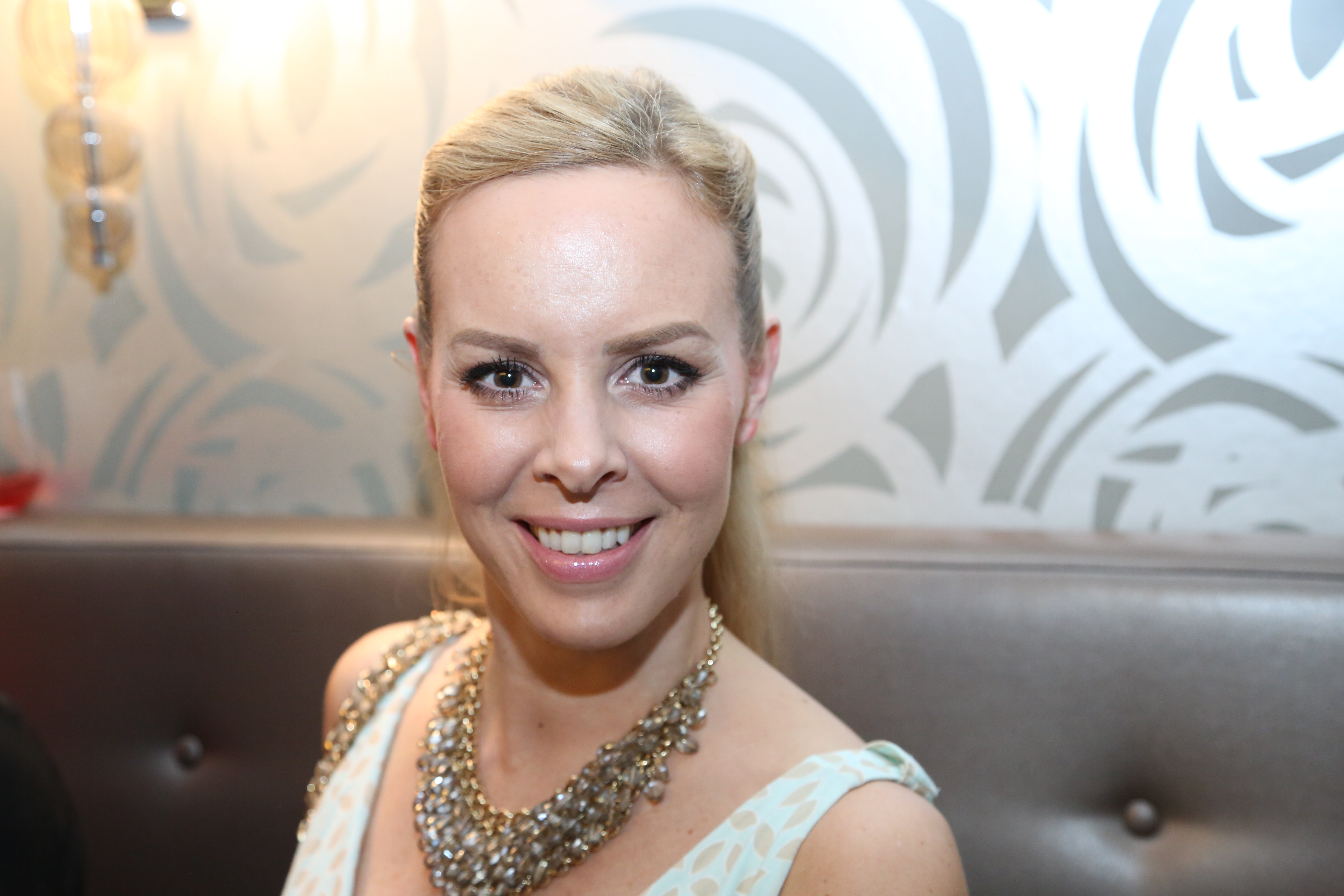 Isabel Edvardsson bei der Aspria-Sommerparty 2017 am 17. Juni in Hamburg.